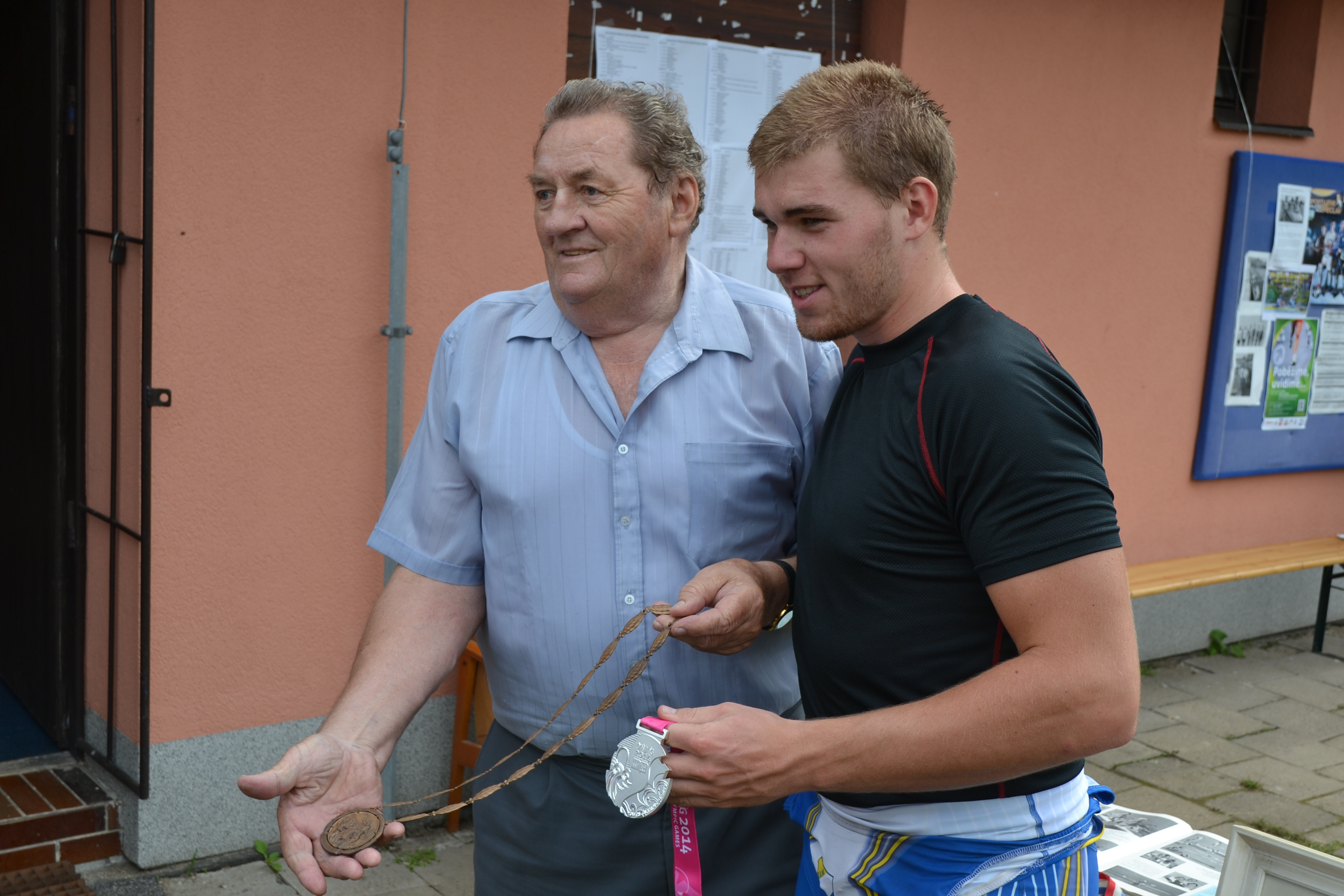 Slovácká regata v Břeclavi 2014